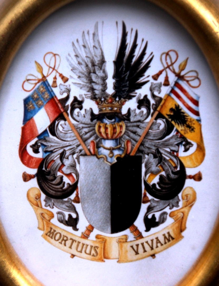 Erweitertes Abensperg und Traun`sches Wappen ab dem 18. Jhd.